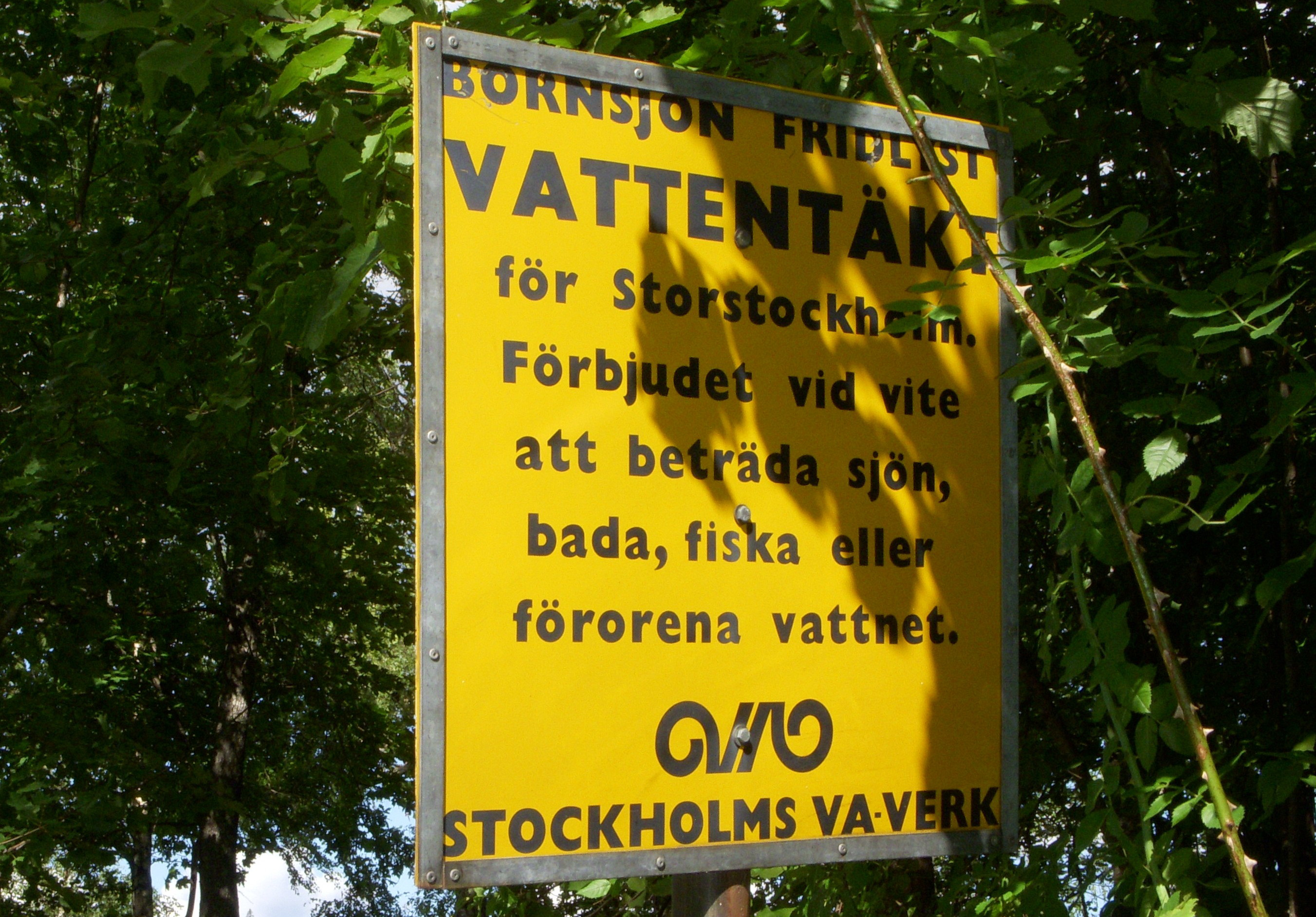 Vattenreservat Bornsjön